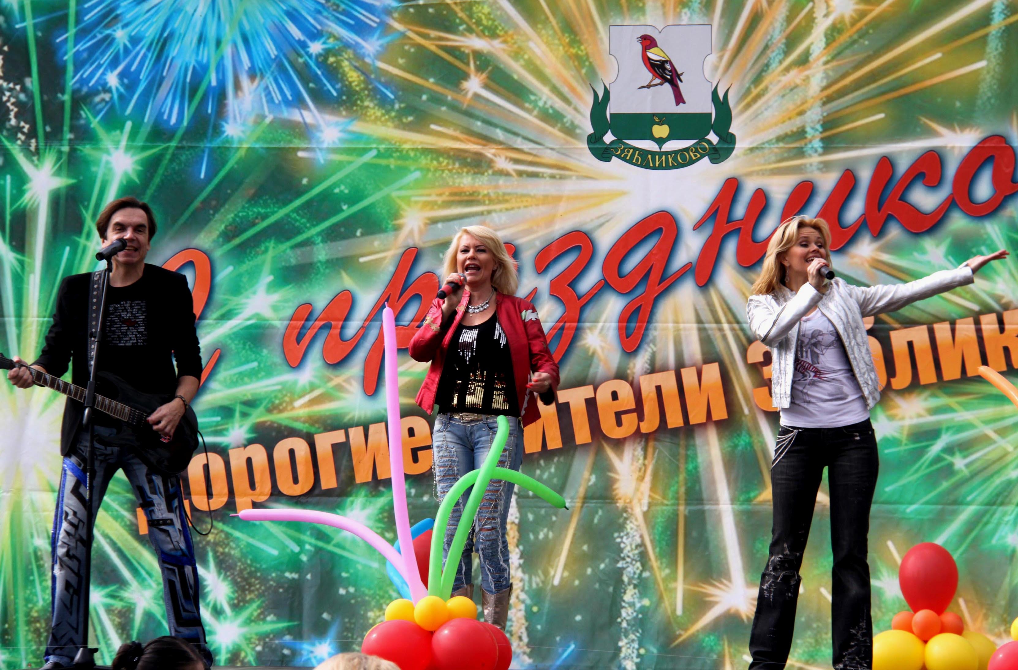 Группа "Унесённые ветром". Выступление на Дне города Москвы в районе Зябликово города Москвы, 7 сентября 2013 года